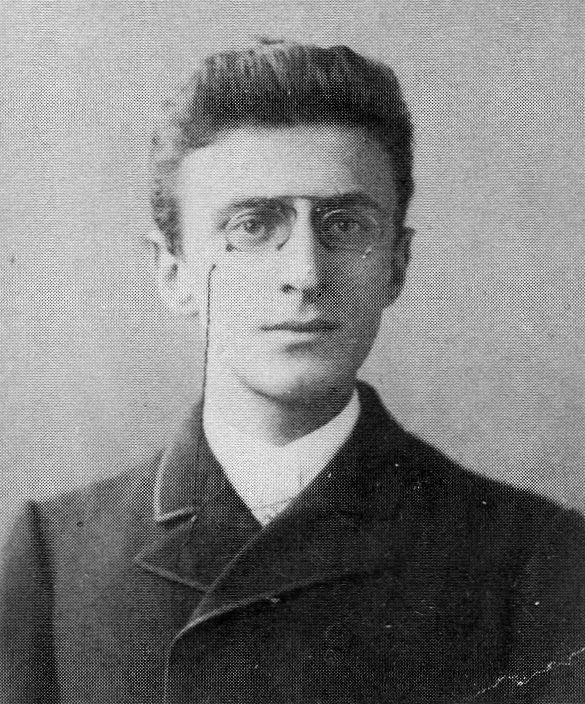 Eduard Norden (1868–1941), deutscher Altertumswissenschaftler. Aufnahme aus dem Berliner Studienjahr (1888) des Bonner Studenten.